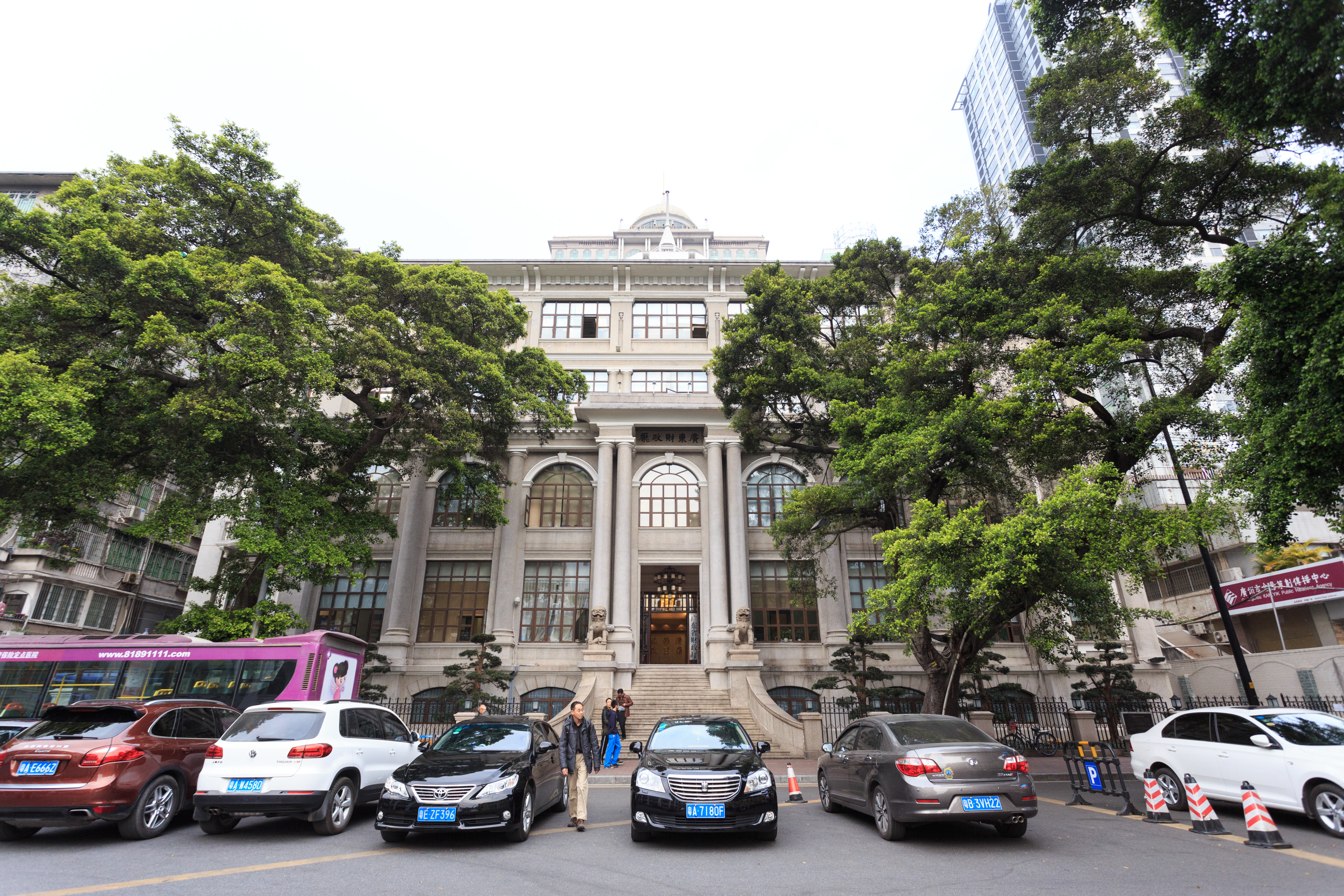 广东财政厅旧址